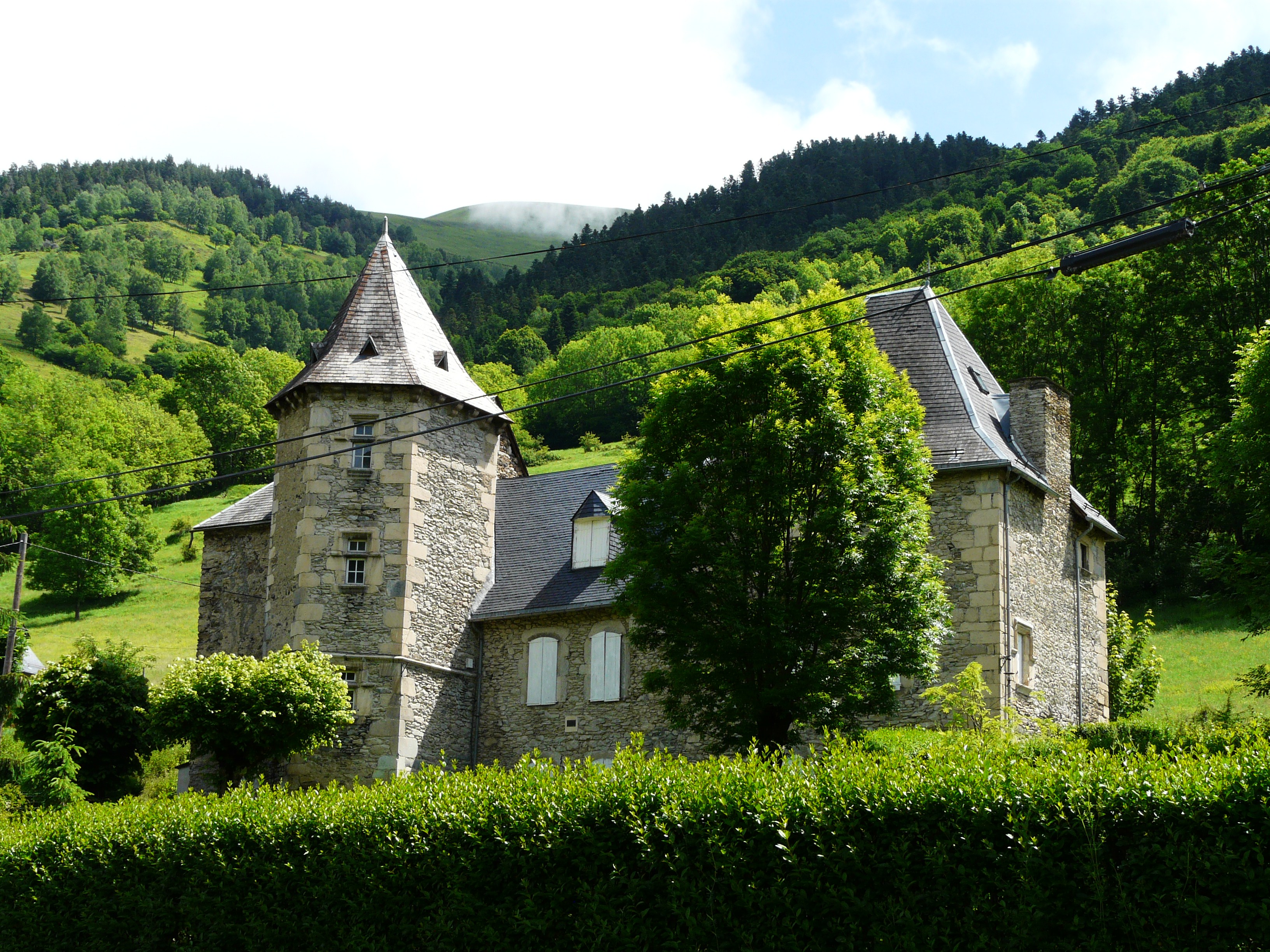 Le château de Saint-Paul-d'Oueil vu du sud-ouest, Haute-Garonne, France.